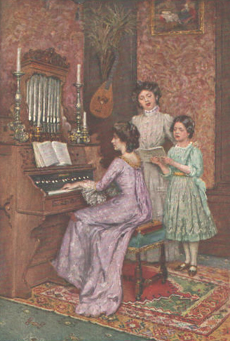 Ein frommes Lied